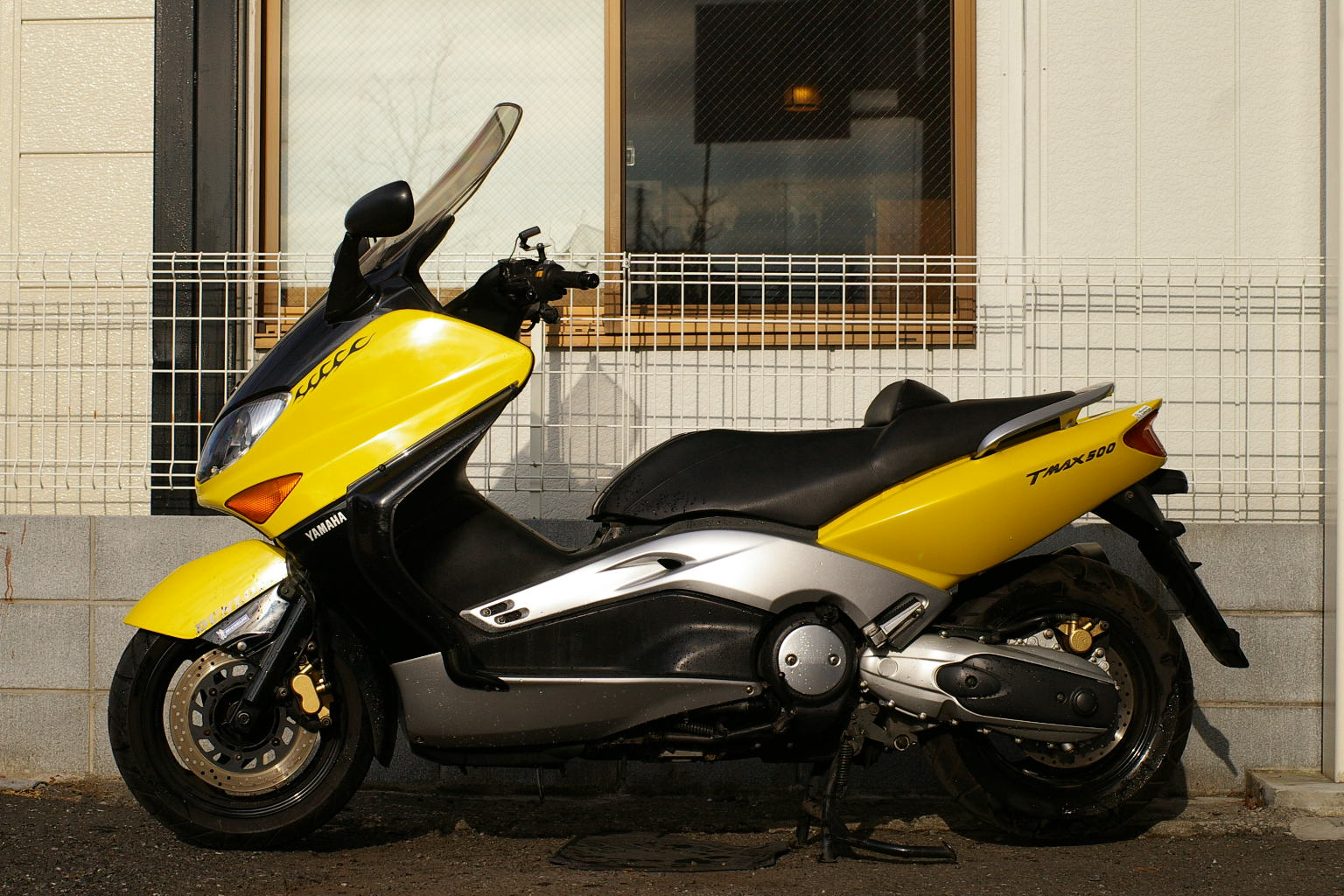 TMAXです